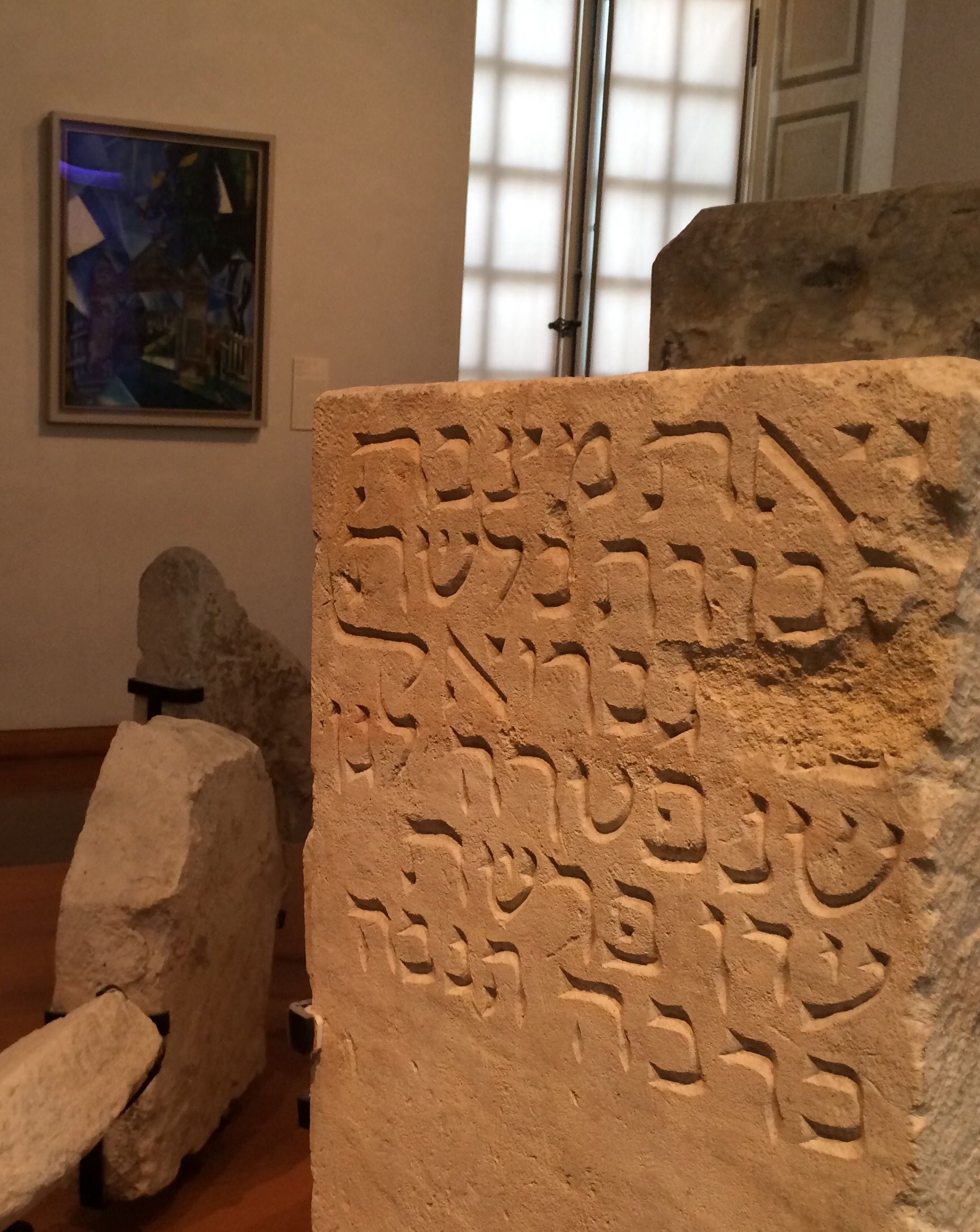 Stèles funéraires provenant d'un cimetière juif parisien du XIIIe siècle - Musée d'art et d'histoire du Judaïsme